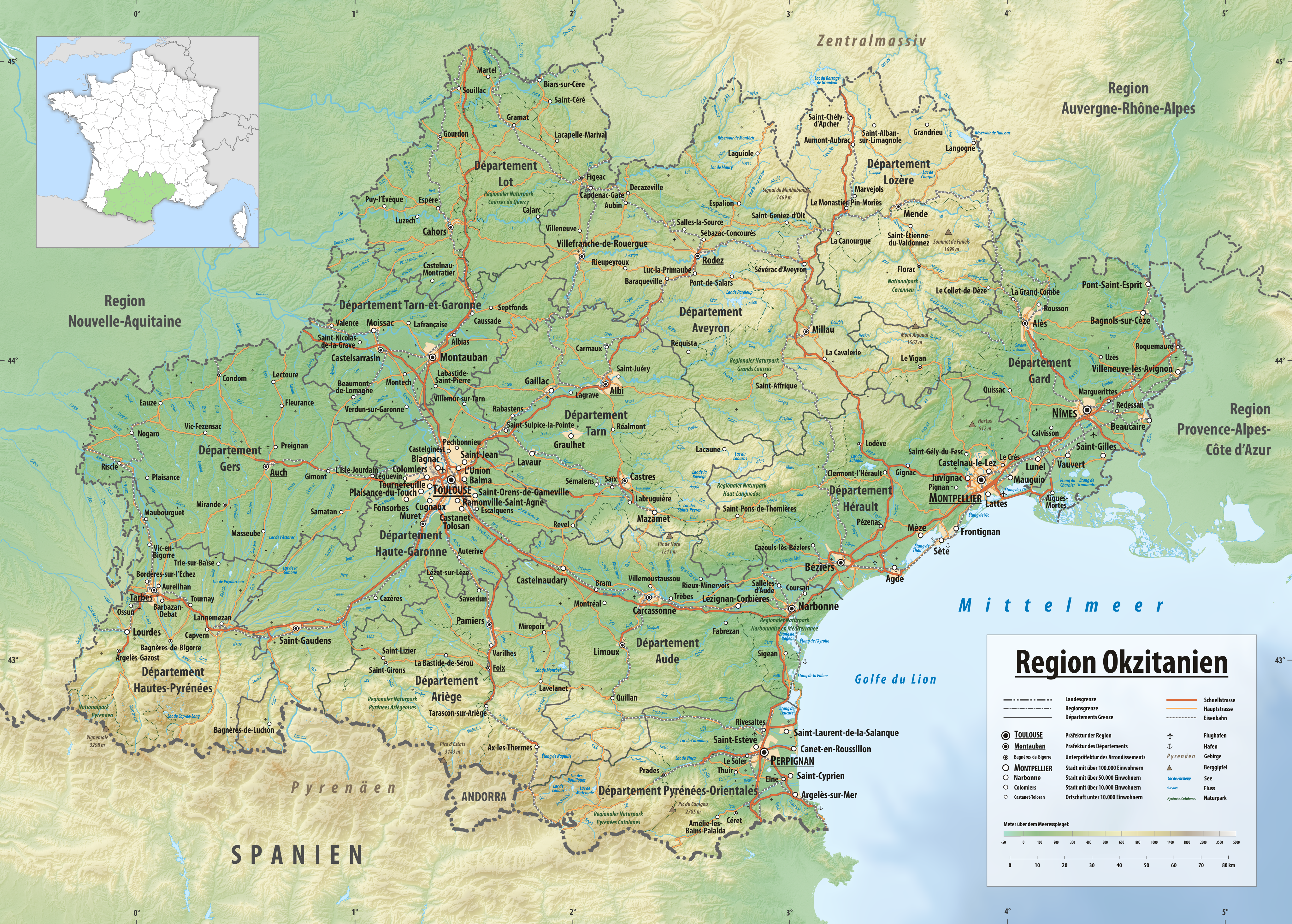 Reliefkarte der Region Okzitanien Topographischer Hintergrund: NASA Shuttle Radar Topography Mission (public domain). SRTM3 v.2.